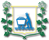 Brasão do município de Lajes, estado do Rio Grande do Norte, Brasil.